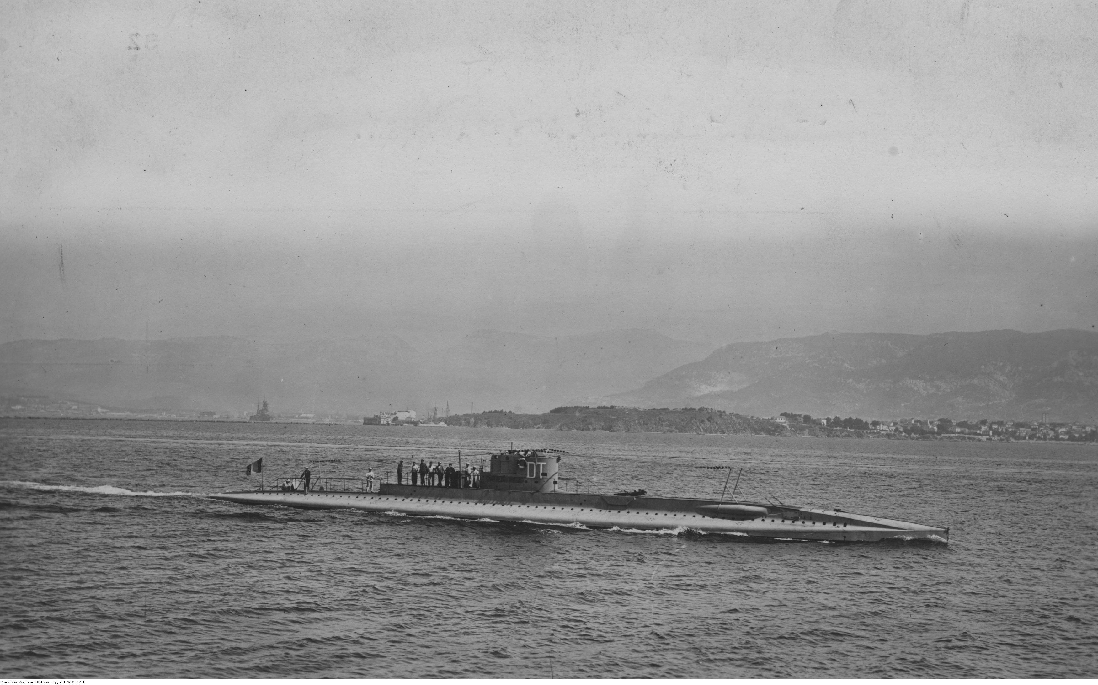 Francuski okręt podwodny "Louis Dupetit-Thouars" (typu O’Byrne) wpływa do portu w Tulonie.